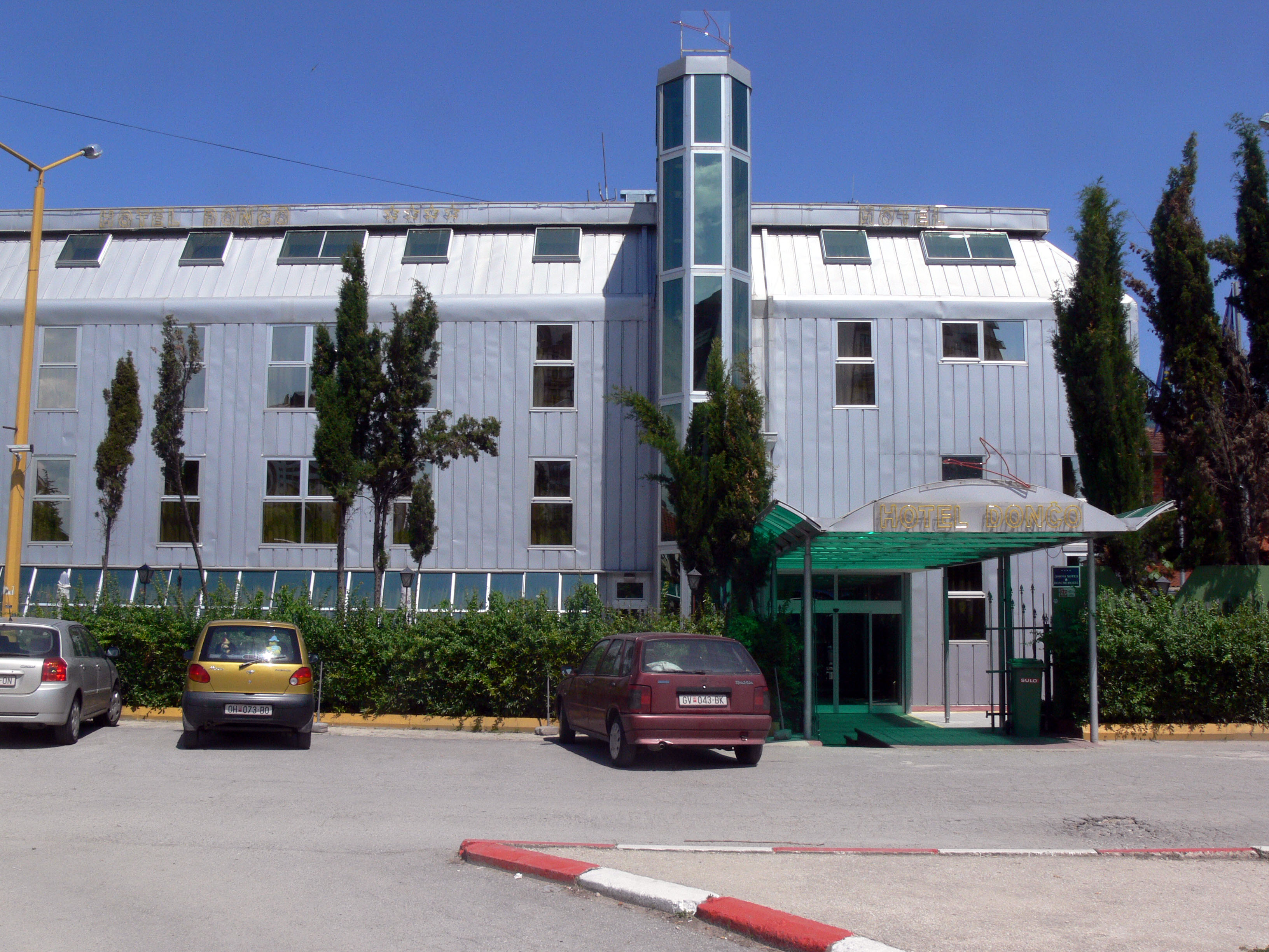 Hotel Donco in der Republik Mazedonien bei Ohrid